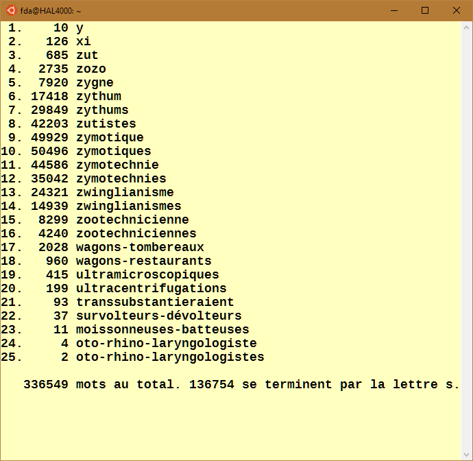 Exécution dans WSL d'une variante du programme indiqué dans l'article curses de la Wikipédia. La restitution des caractères accentués est ici incorrecte.